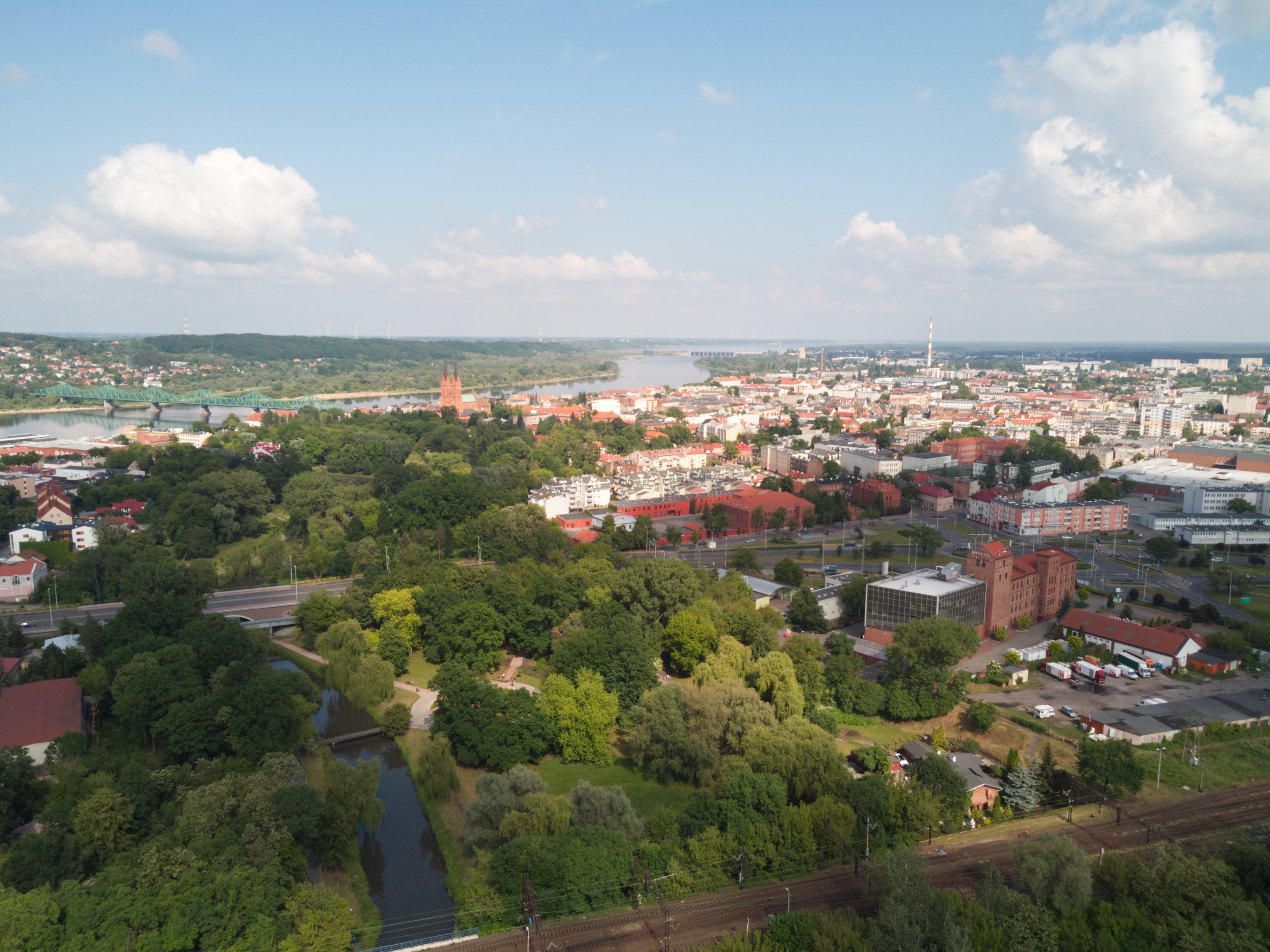 Śródmieście (2020 r.)